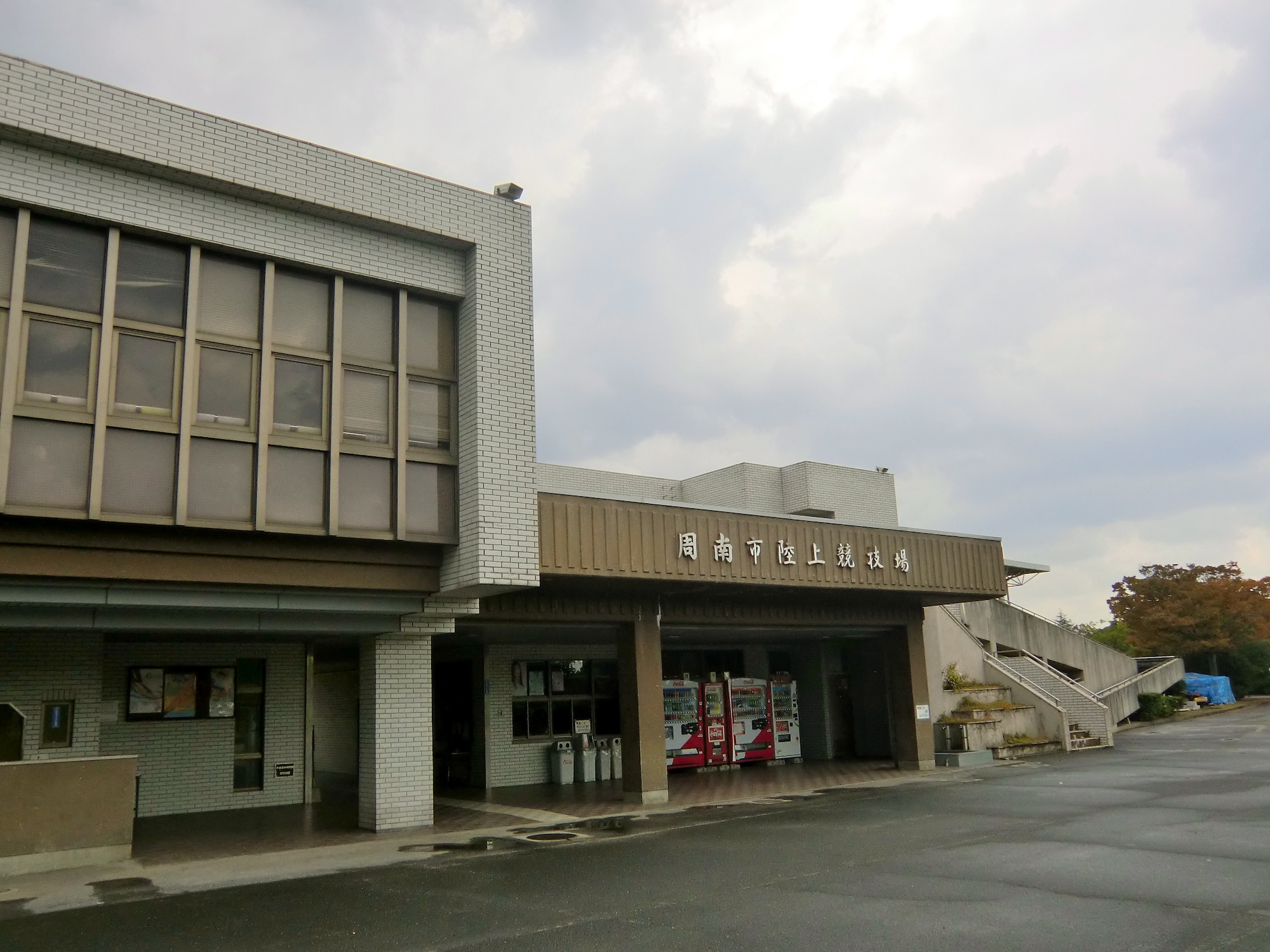 周南緑地公園の周南市陸上競技場（山口県周南市）